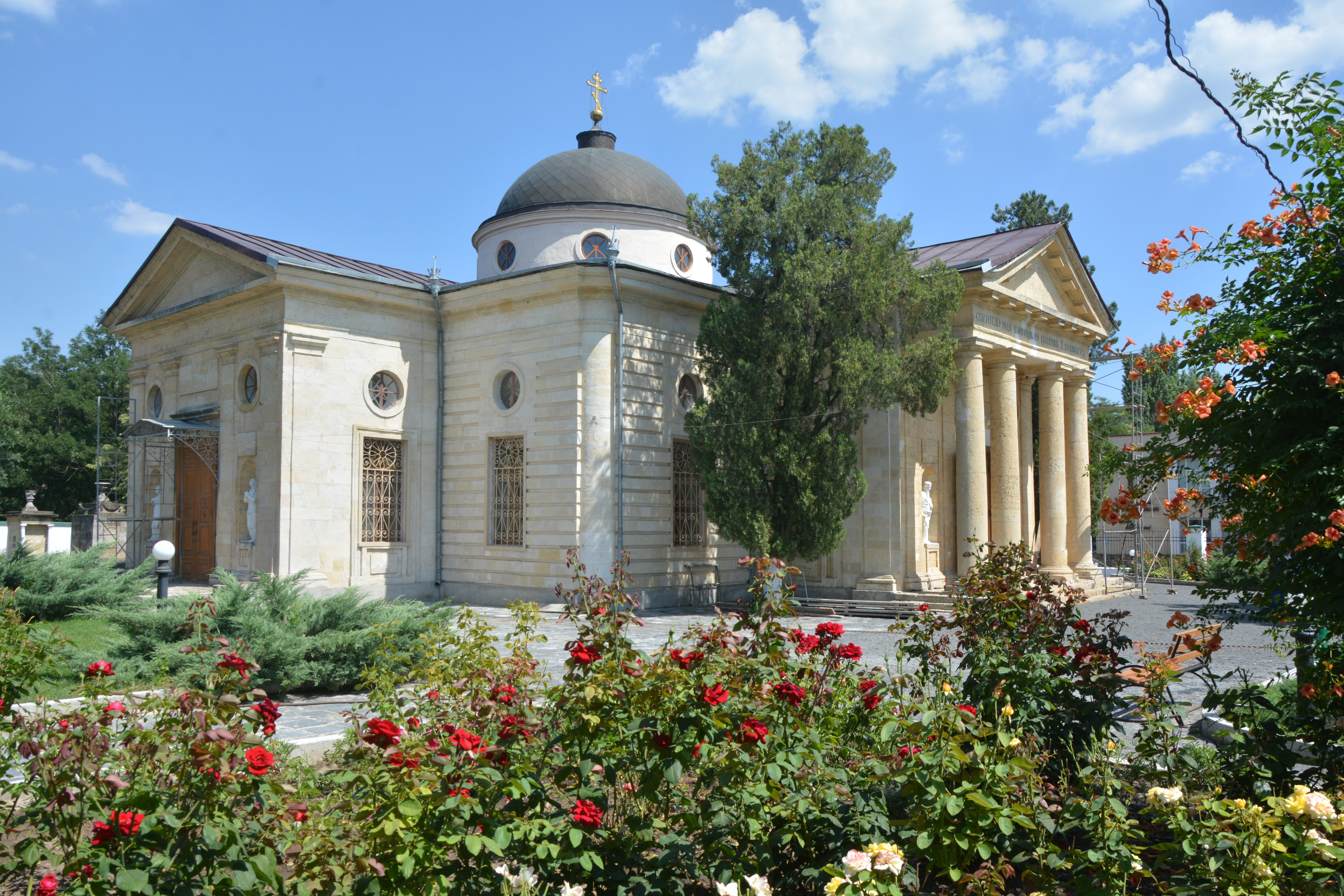 Спаський собор та дзвіниця (Катерининський собор), Херсон, вул. Перекопська, 13 (територія колишньої фортеці)